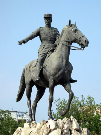 Памятник Николаосу Пластирасу в городе Кардица ("Чёрный всадник")